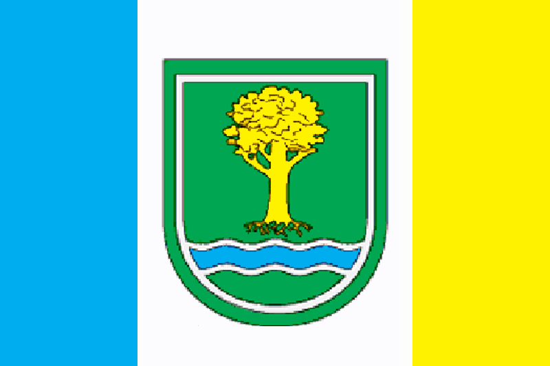 Прапор Савранського району Одеської області України